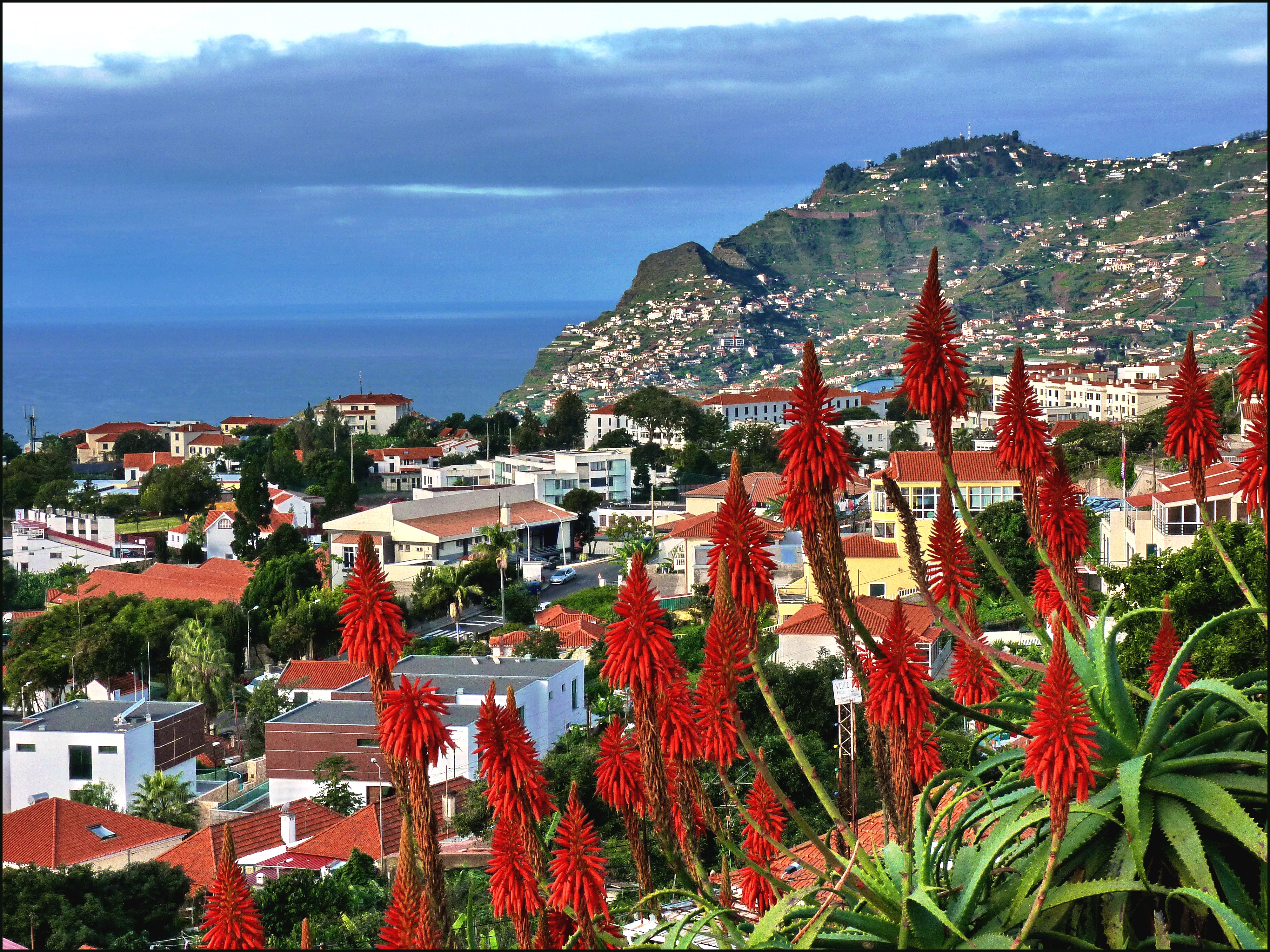 Cabo Girão view